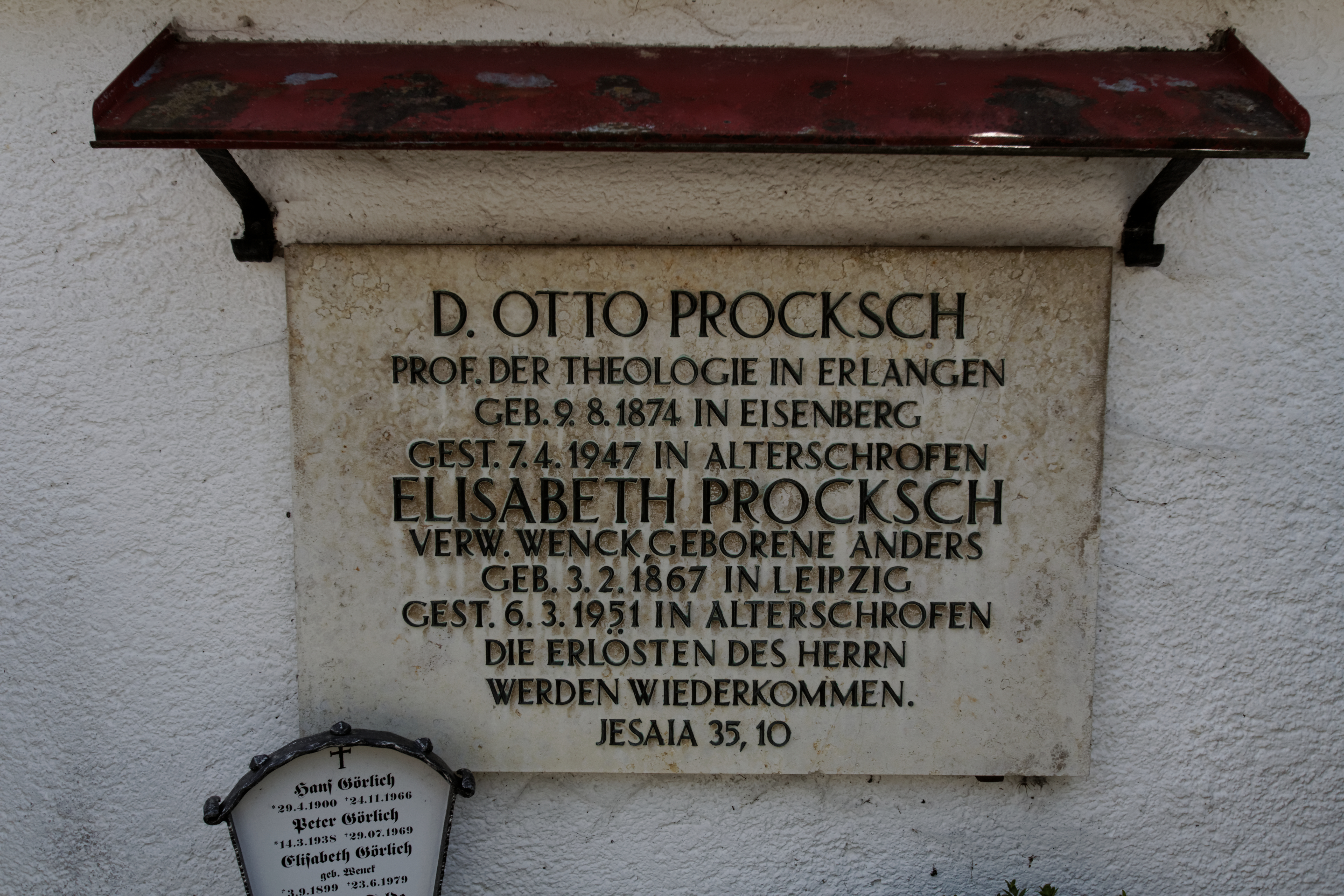 Grabstein Prof. Otto Proksch, Schwangau-Waltenhofen, Pfarrkirche Sankt Maria und Florian